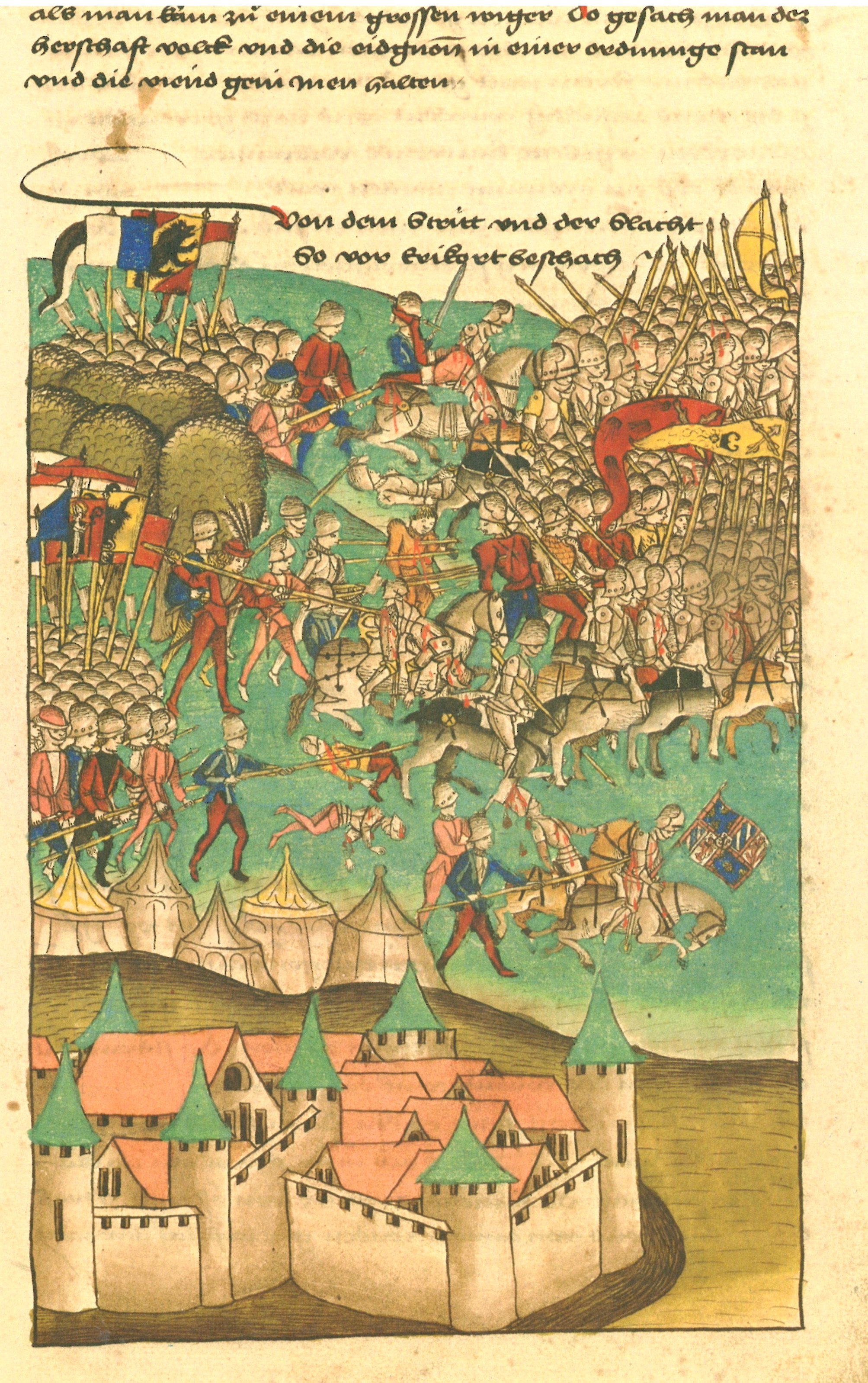 Schlacht bei Héricourt am 13. November 1474. Das burgundische Heer flieht